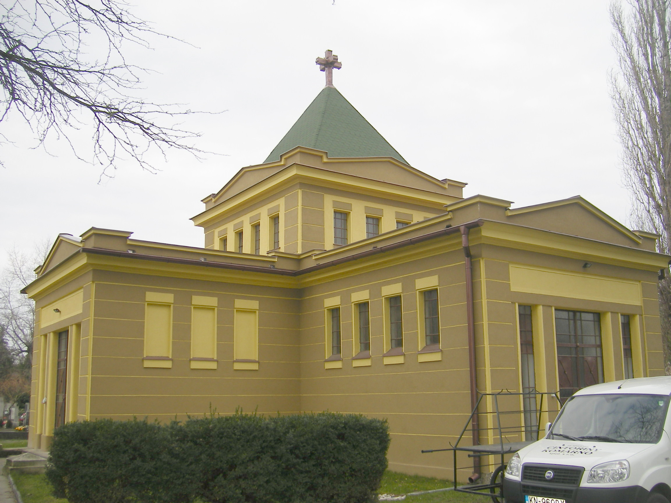 Komárom - a ravatalozó a katolikus temetőben